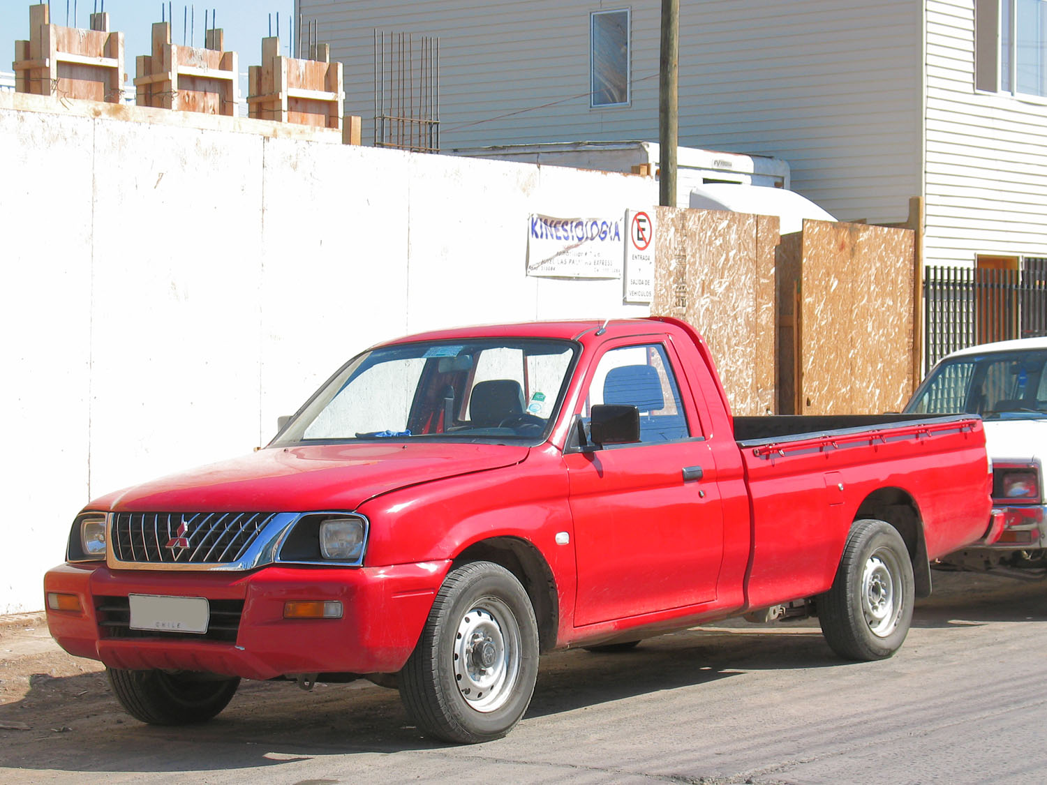 2003 l200